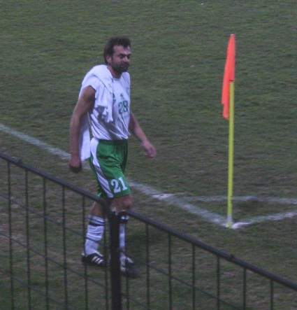 Tököli Attila magyar labdarúgó Pécsen